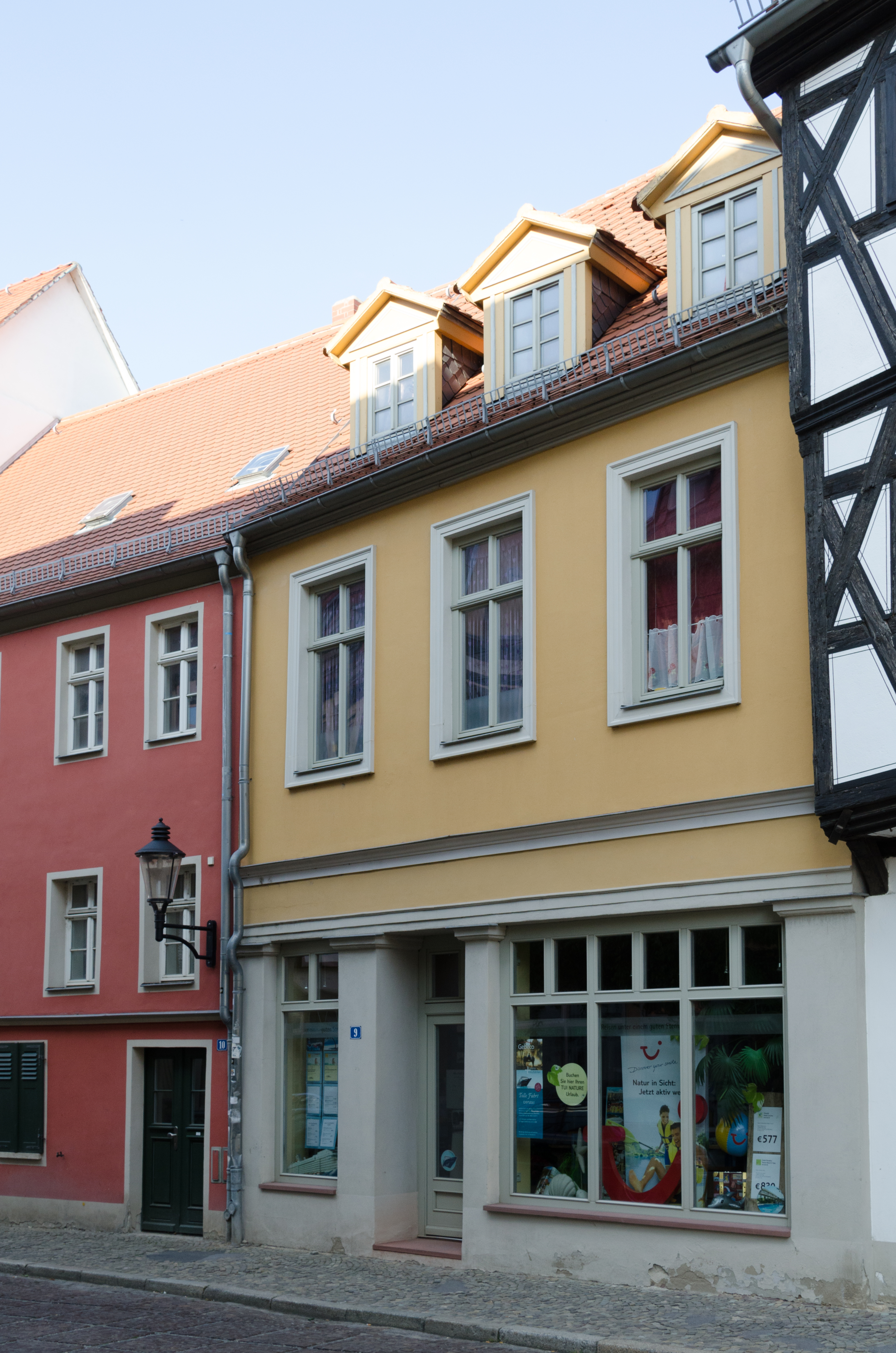 Naumburg, Marienstraße 9